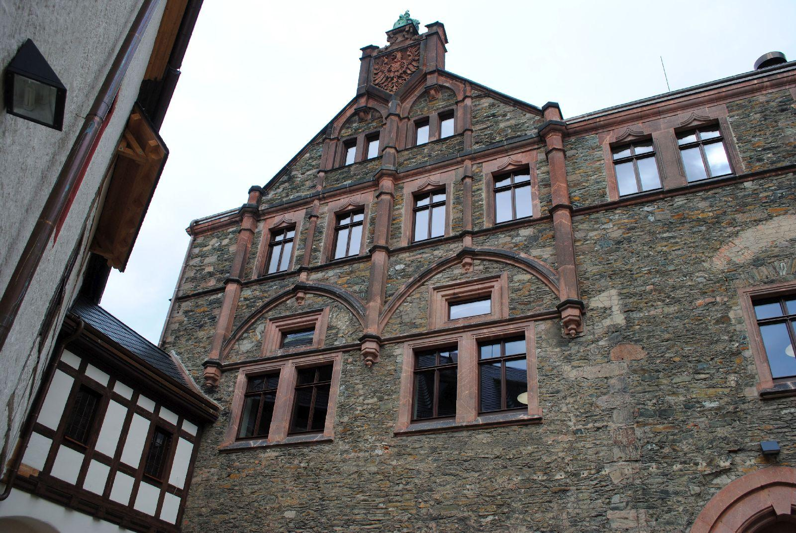 Fassade im Innenhof